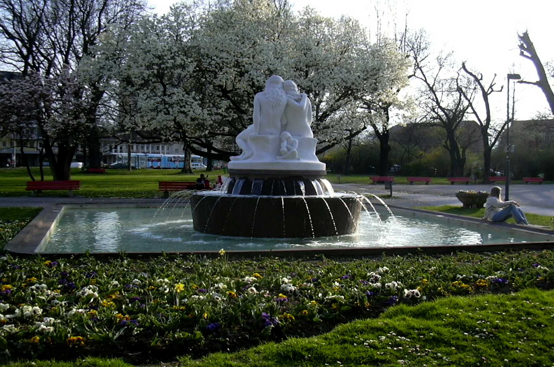 Rapoldibrunnen